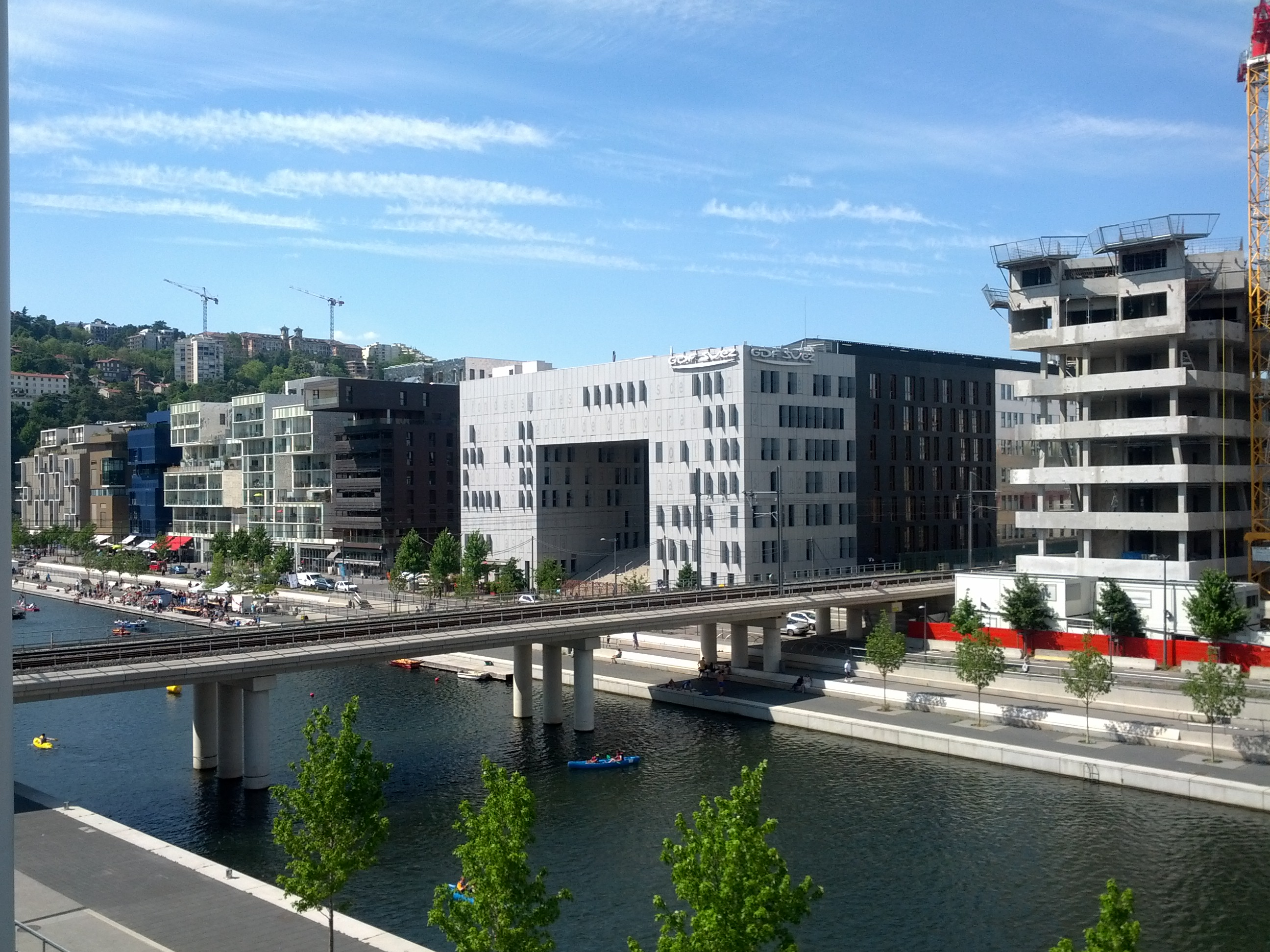 Bassin nautique et viaduc SNCF à Confluence, Lyon